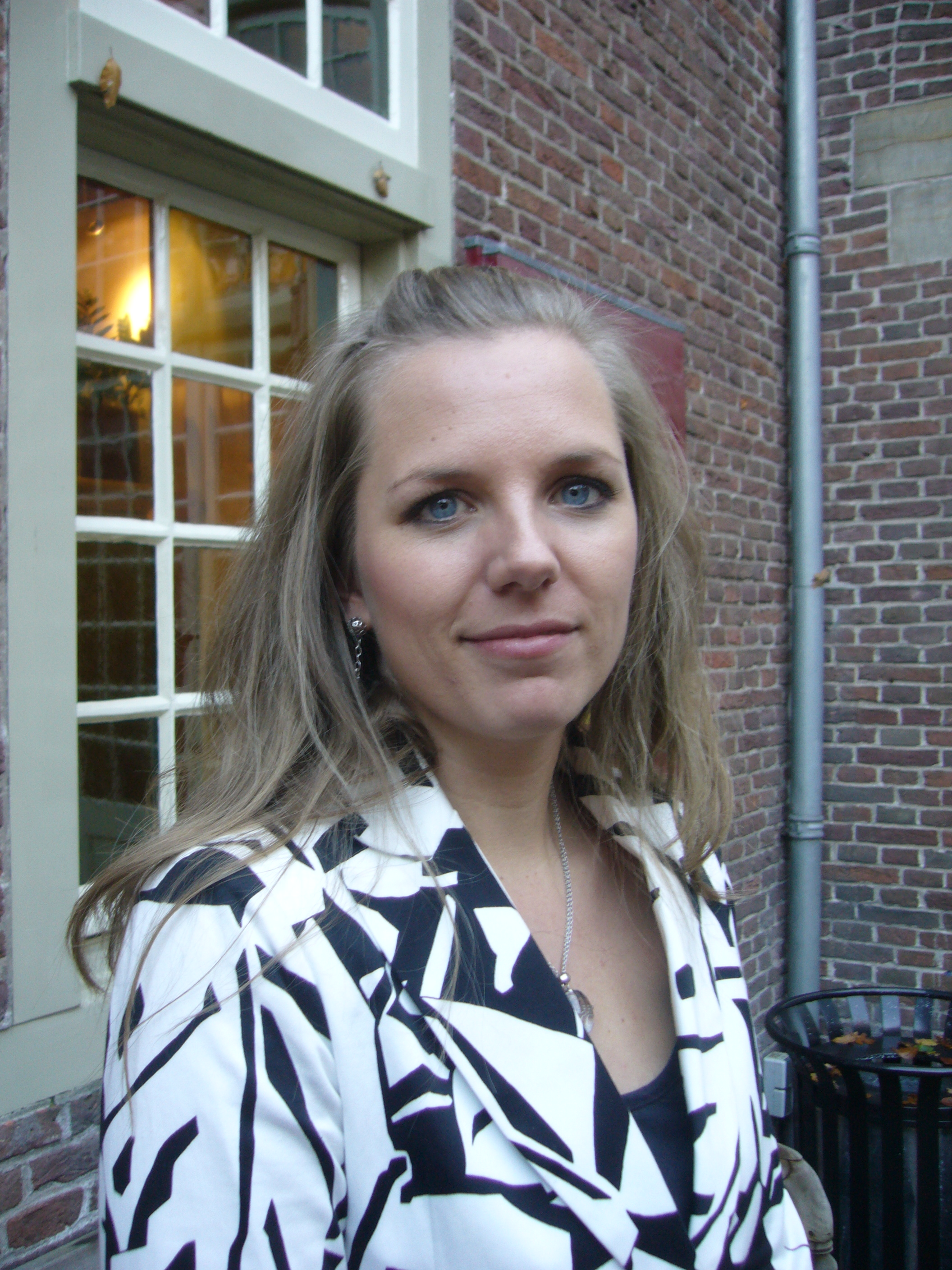 Florien Hilgenkamp na optreden op Nijenrode